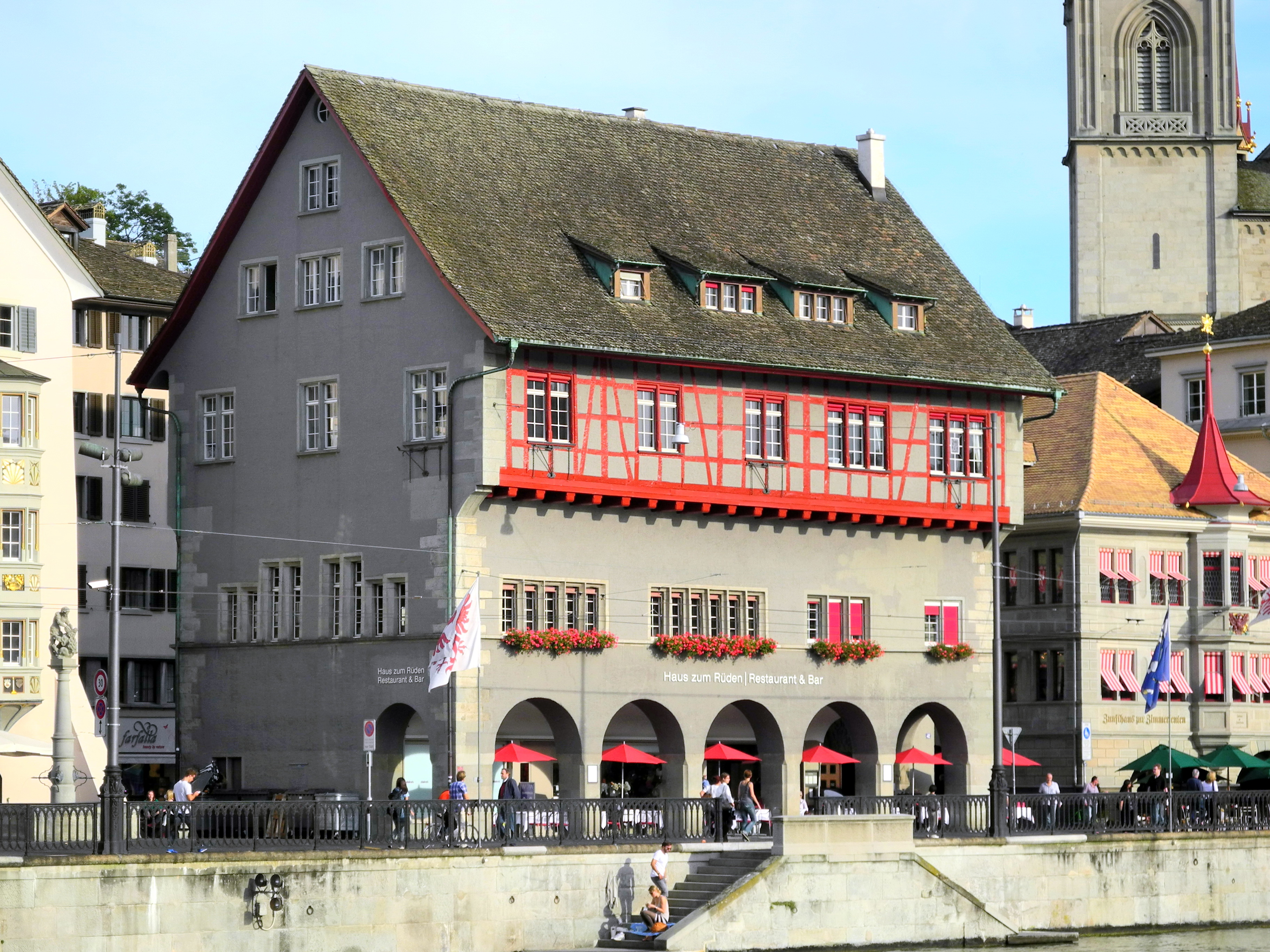 Gesellschaftshaus zum Rüden